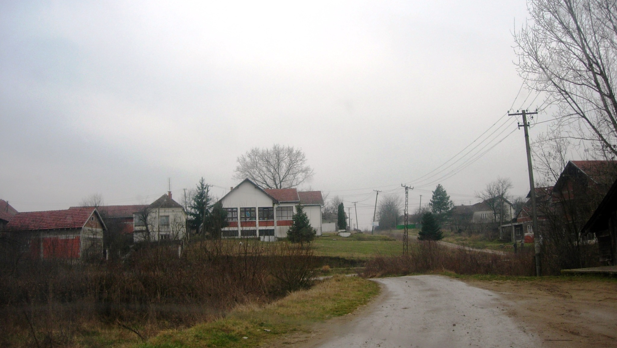 Kacabać